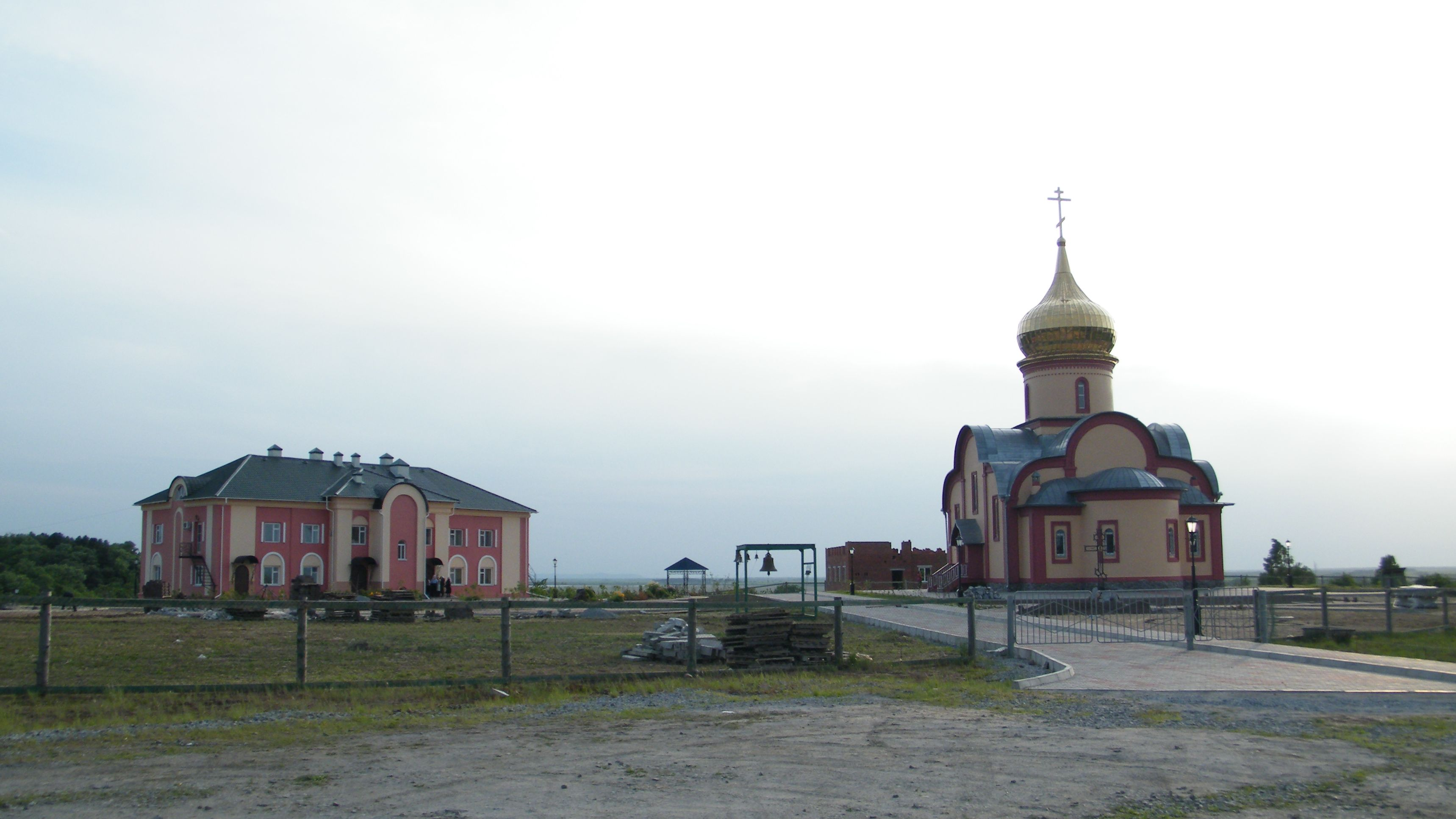 Петропавловский монастырь (Хабаровский край)